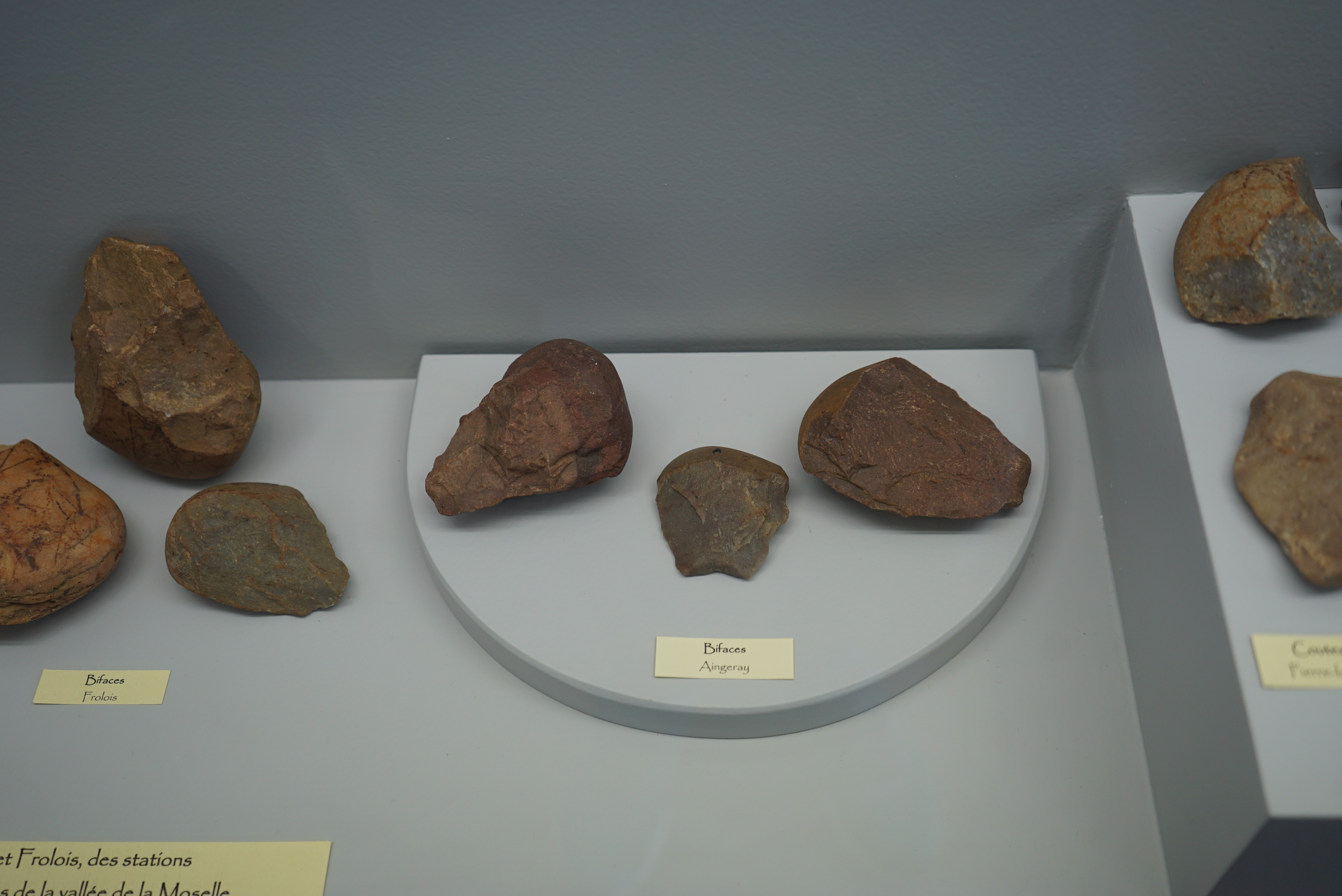 néolithique, objets du musée de TOul.